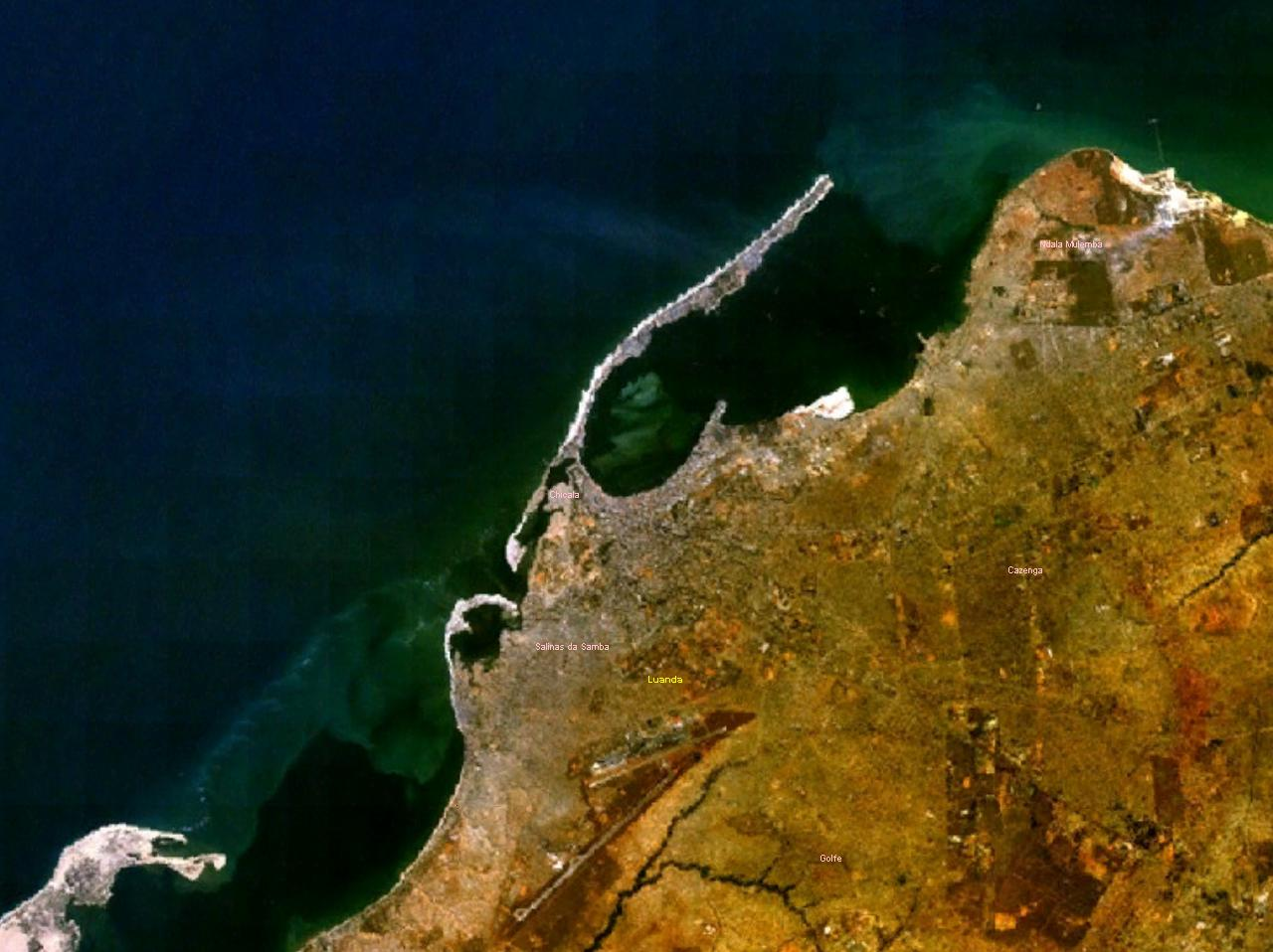 Luanda